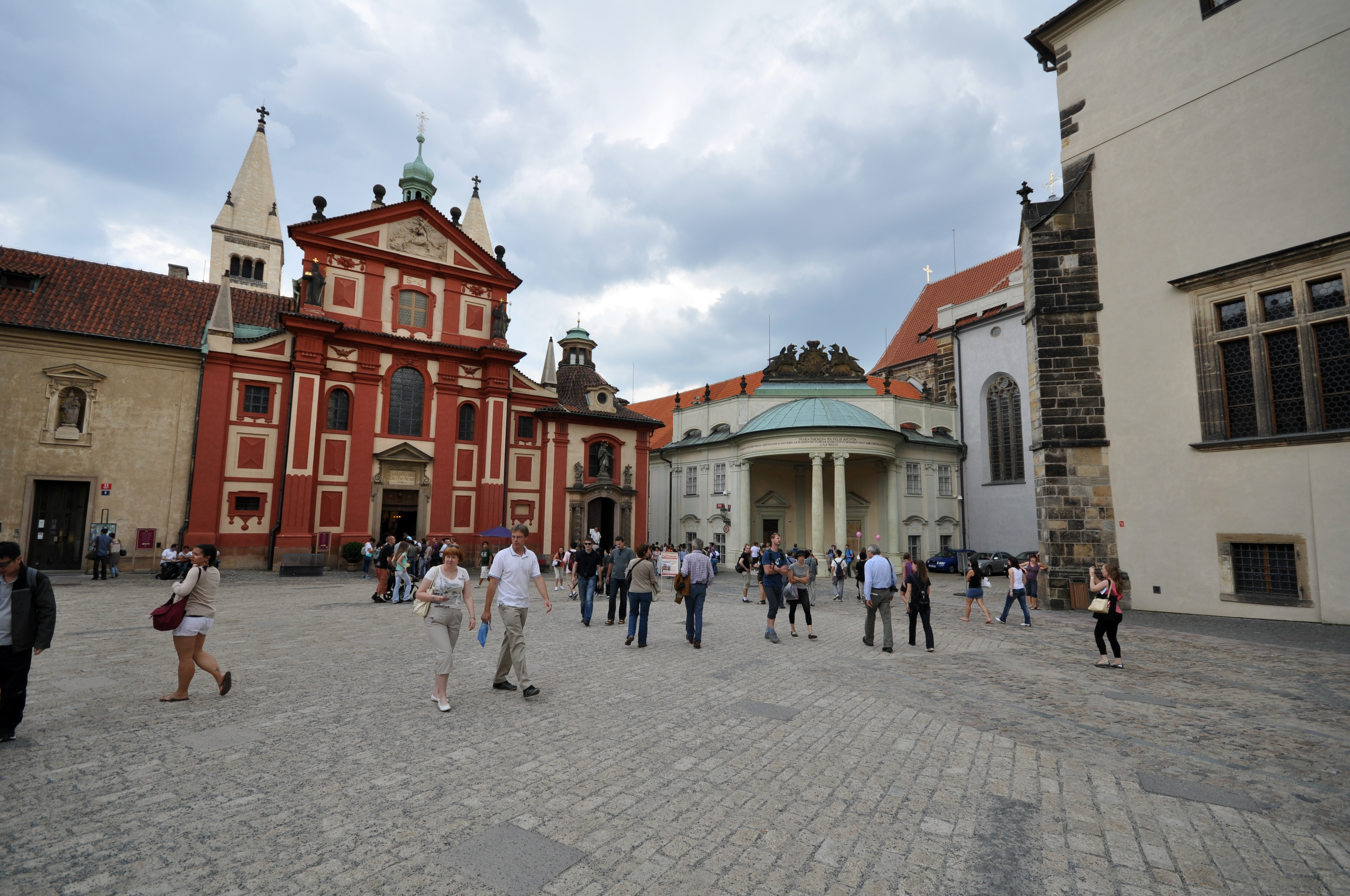 Prag